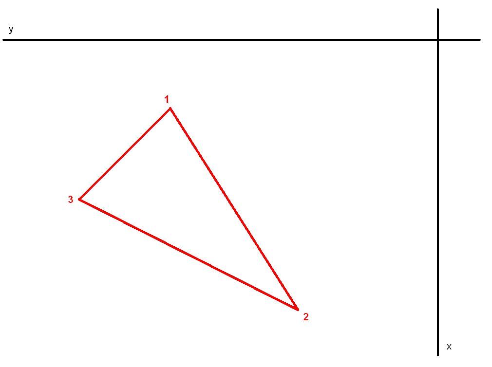 Výpočet plochy pomocí L´Huillierových vzorců - Základní obrazec